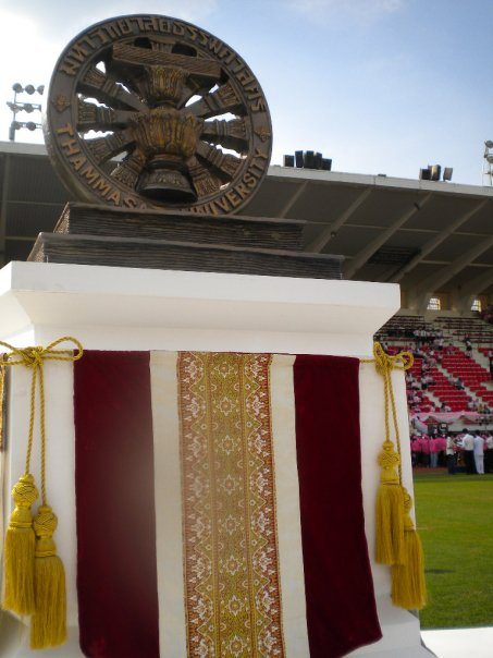 เสลี่ยงเชิญตราธรรมจักรในงานฟุตบอลประเพณีโดยองค์การนักศึกษา ร่วมกับคณะนิติศาสตร์ มหาวิทยาลัยธรรมศาสตร์